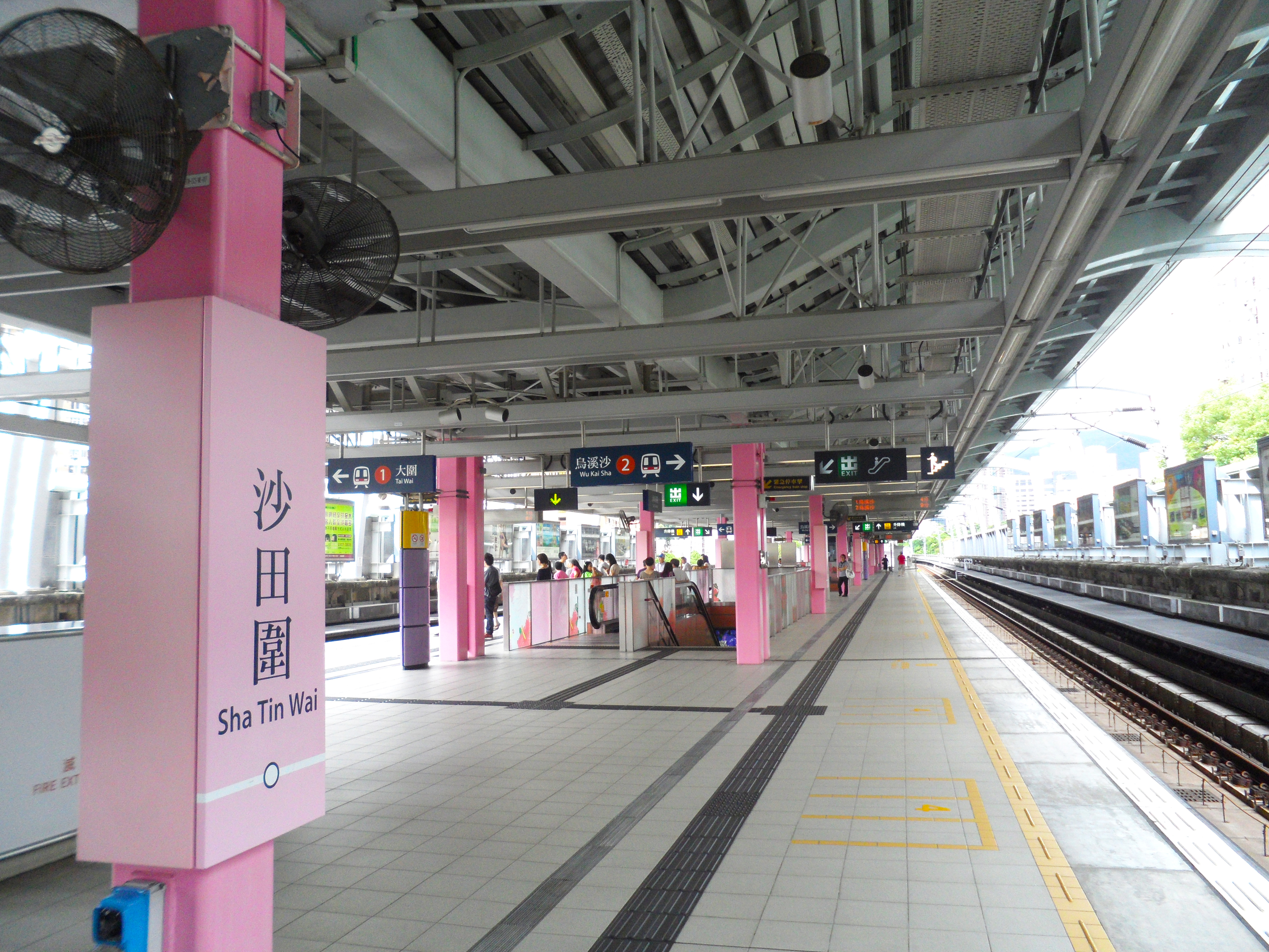 港鐵沙田圍站二號月台